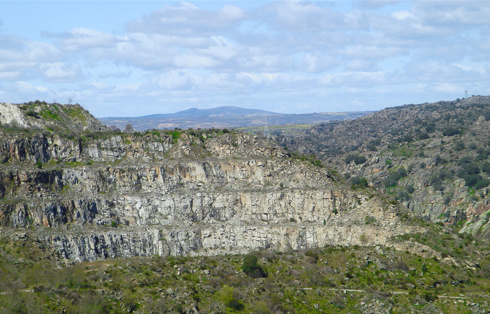 Cantera de la presa de Almendra, Castilla y León, España.